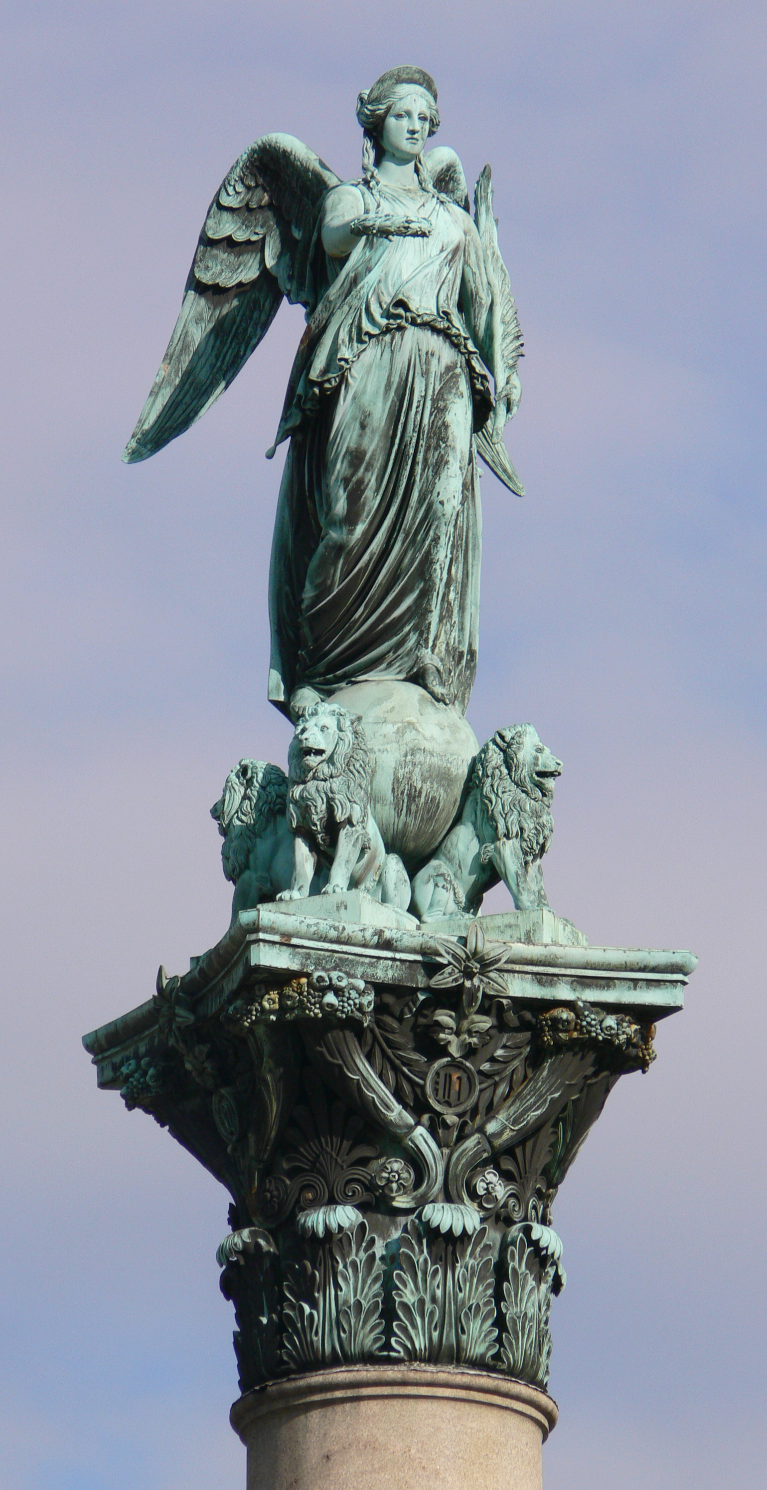 Concordia-Statue (1863) auf der Jubiläumssäule (1841), Schlossplatz, Stuttgart. Bildhauer